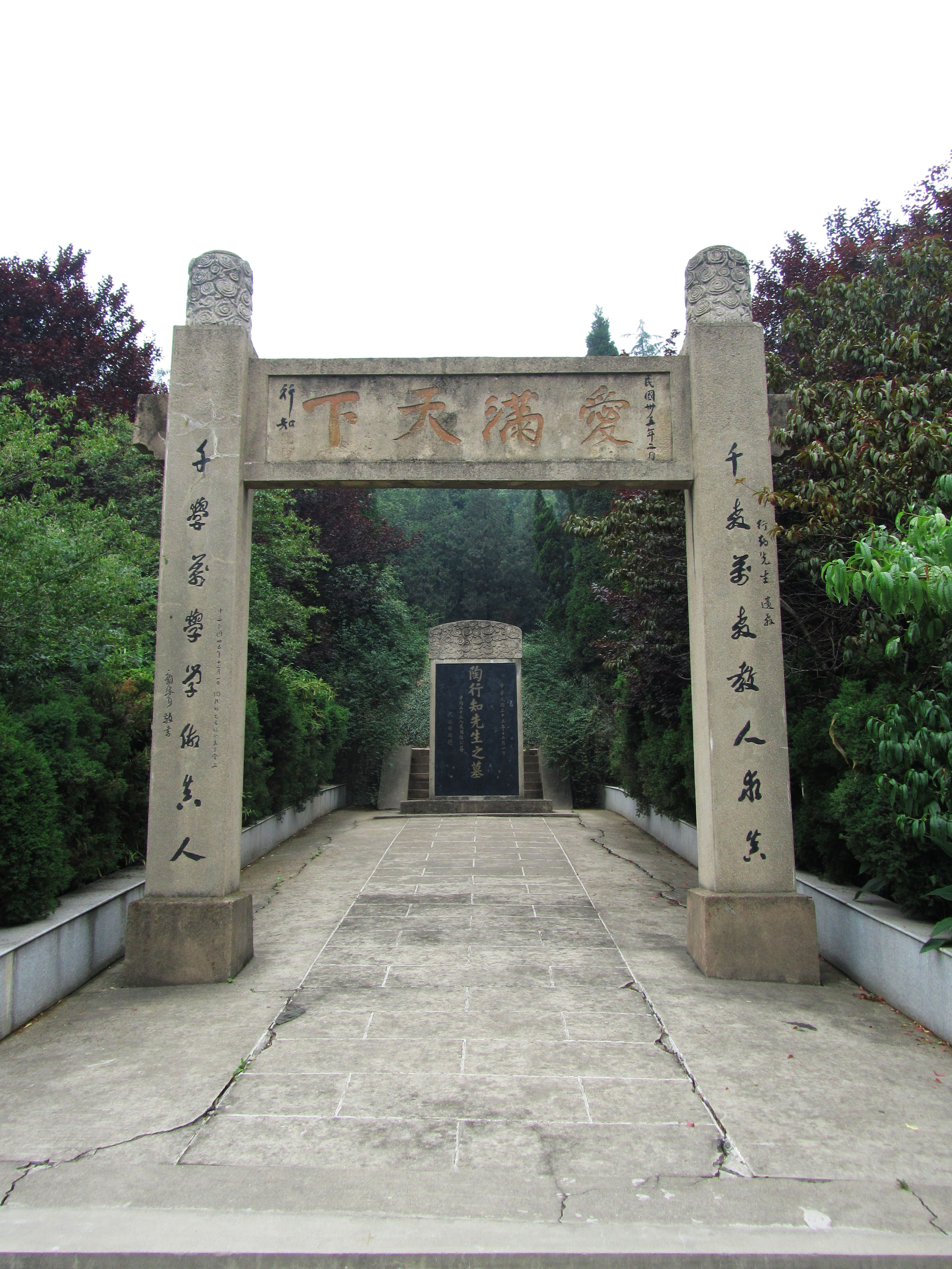 南京劳山陶行知墓。